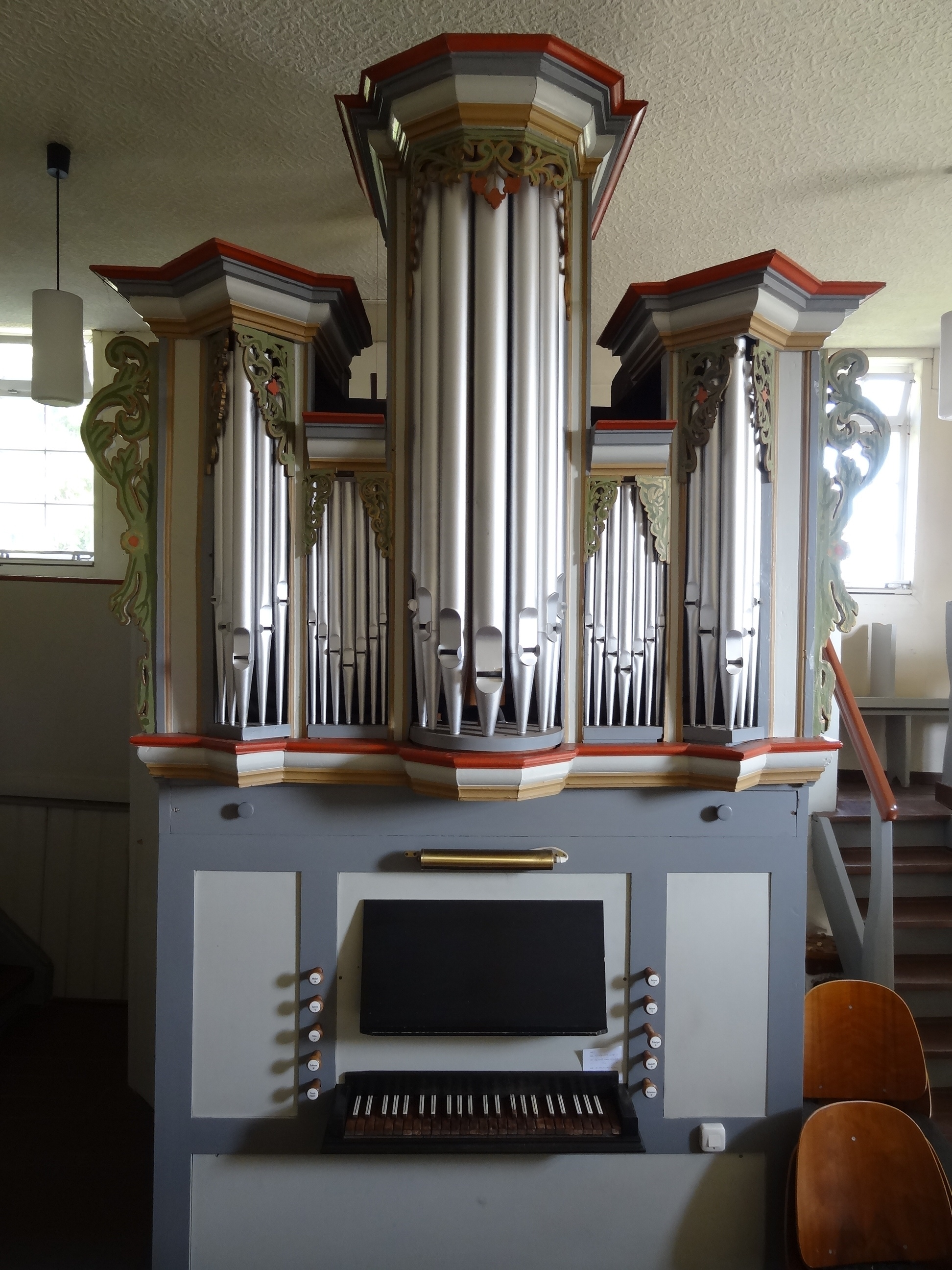 Evangelische Pfarrkirche Reiskirchen